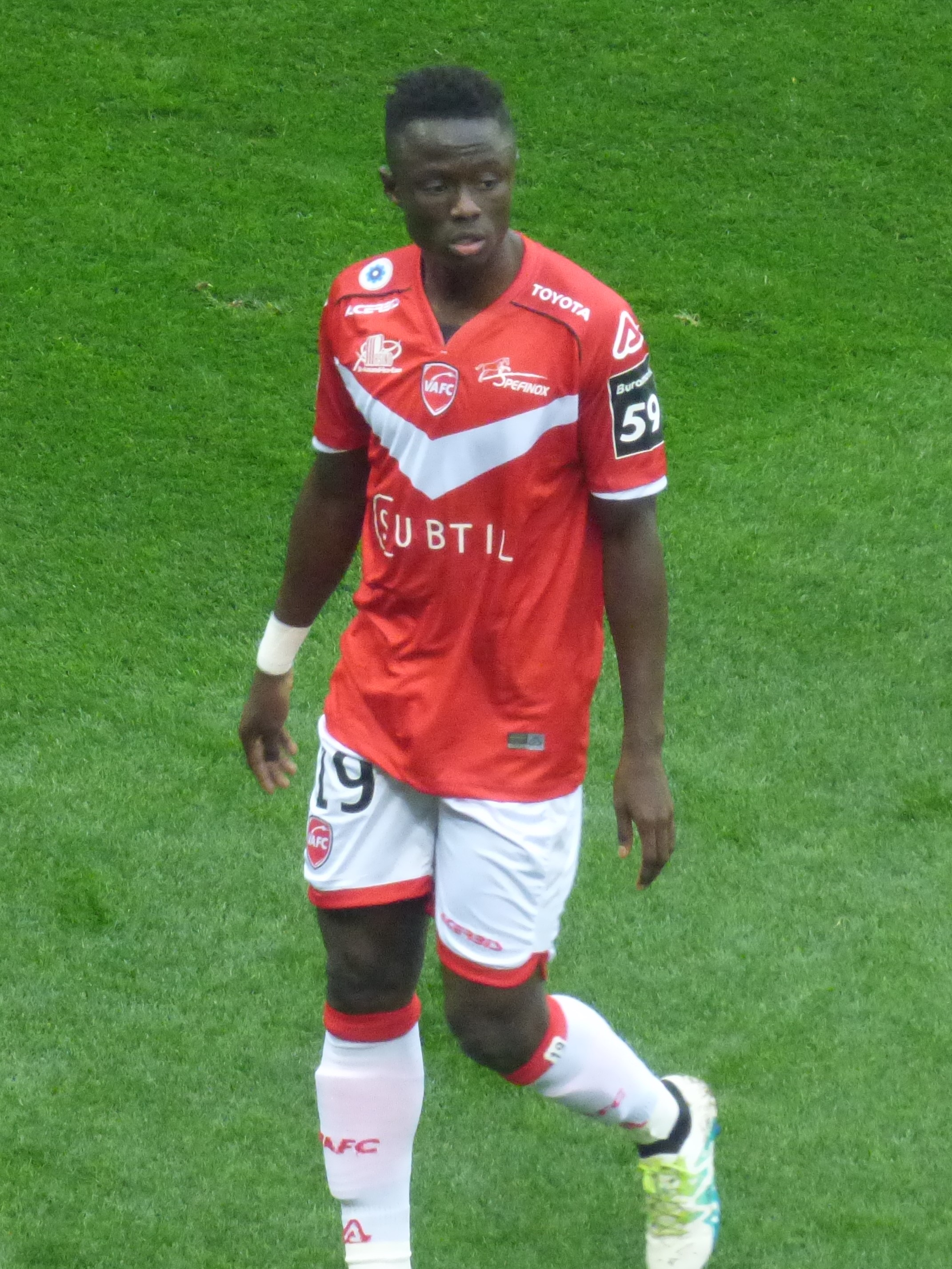 Elhadj Dabo lors du match Valenciennes FC / RC Lens, comptant pour la quatorzième journée du championnat de France de Ligue 2 2018-2019, le 10 novembre 2018, au Stade du Hainaut.